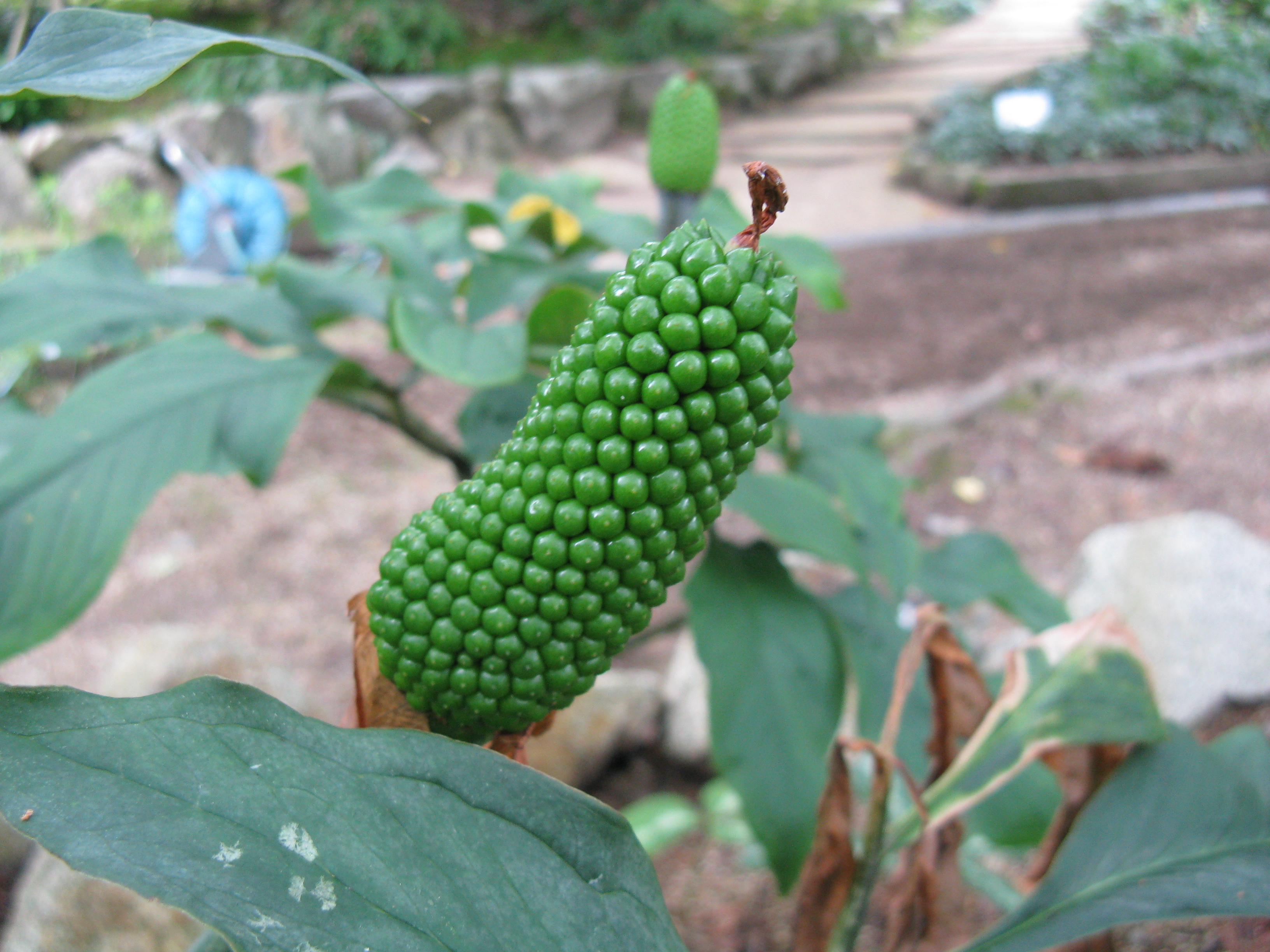 Scientific name Arisaema iyoanum subsp. nakaianum